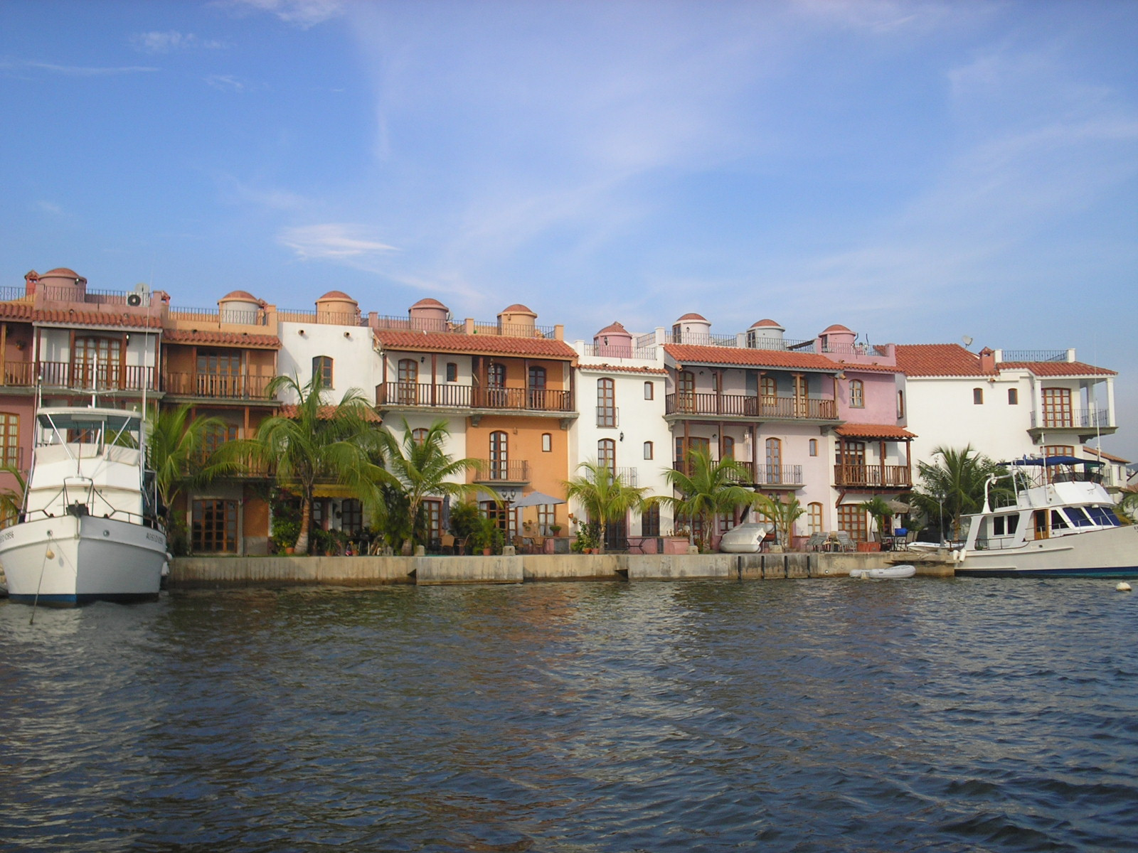 Casas ubicadas en Puerto Morro, Lechería, edo. Anzoátegui.